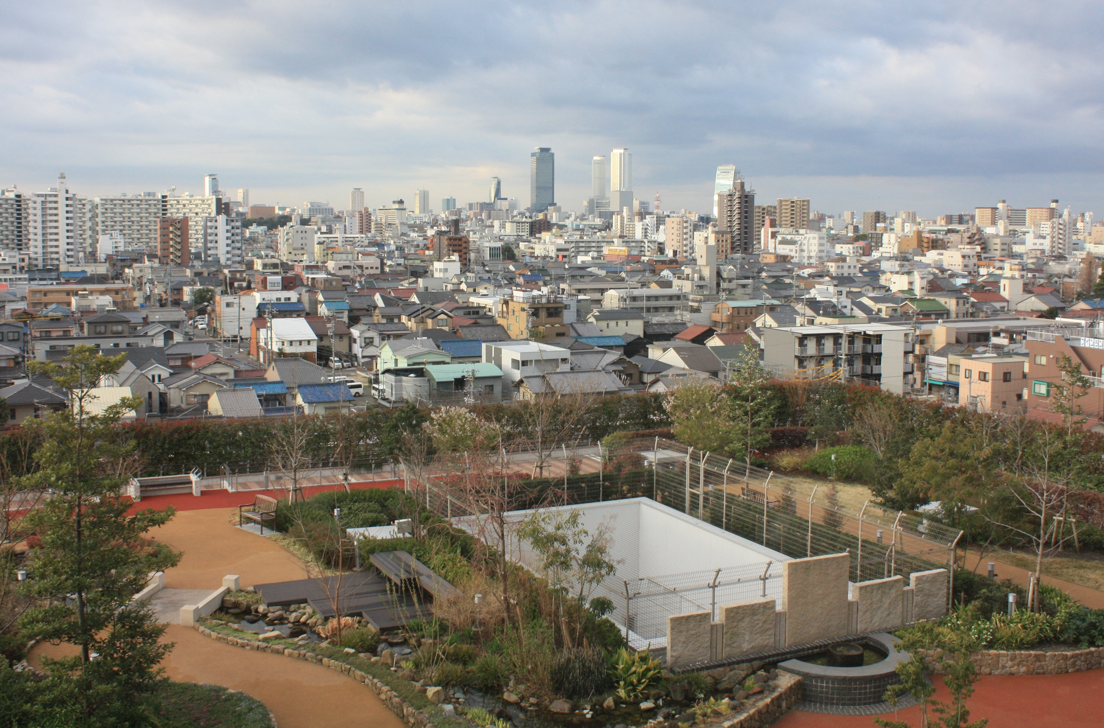 名古屋市立西部医療センター屋上庭園No.1